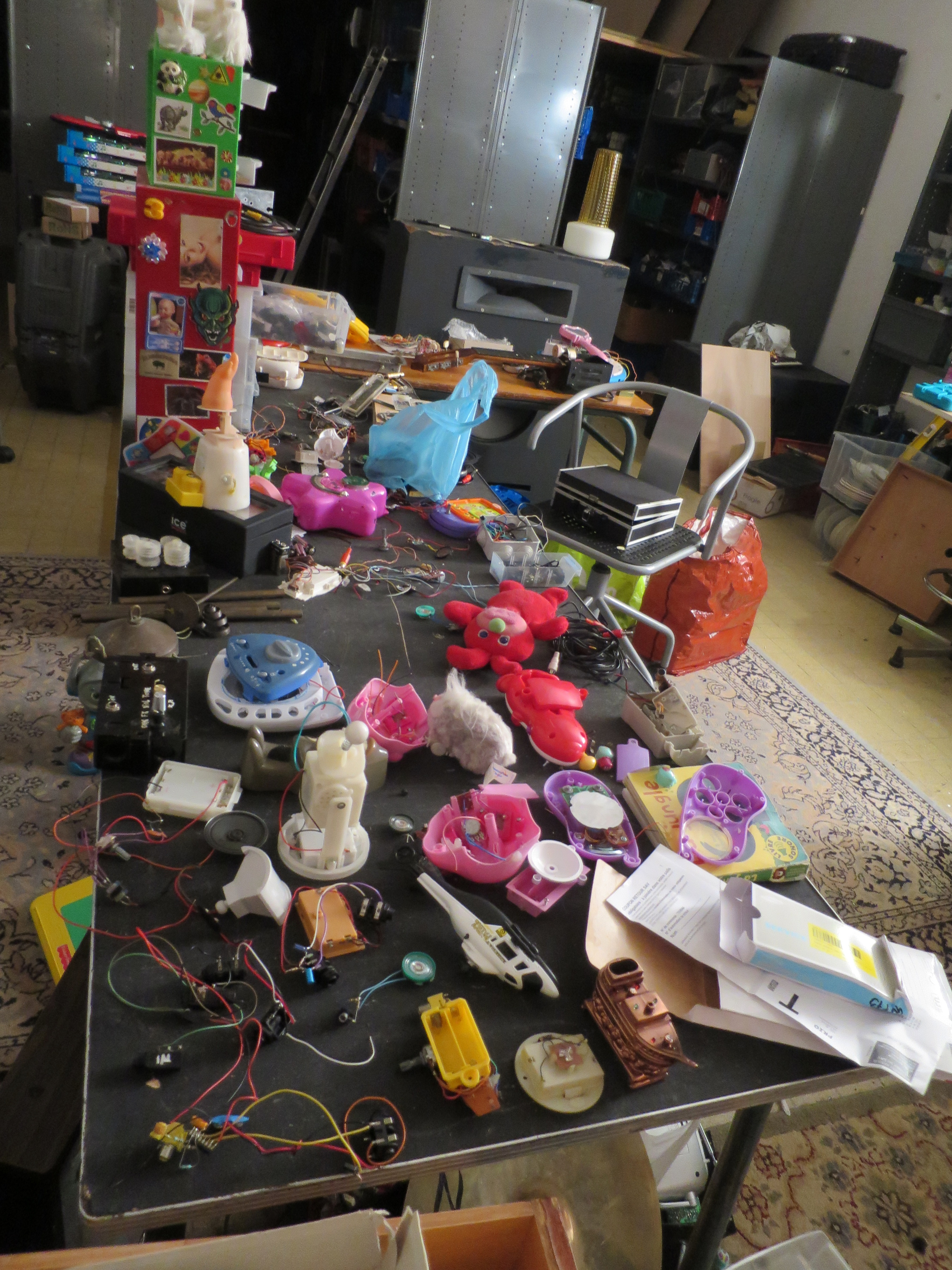 Atelier de circuit-bending à "PiedNu" (Fort de Tourneville, Le Havre)